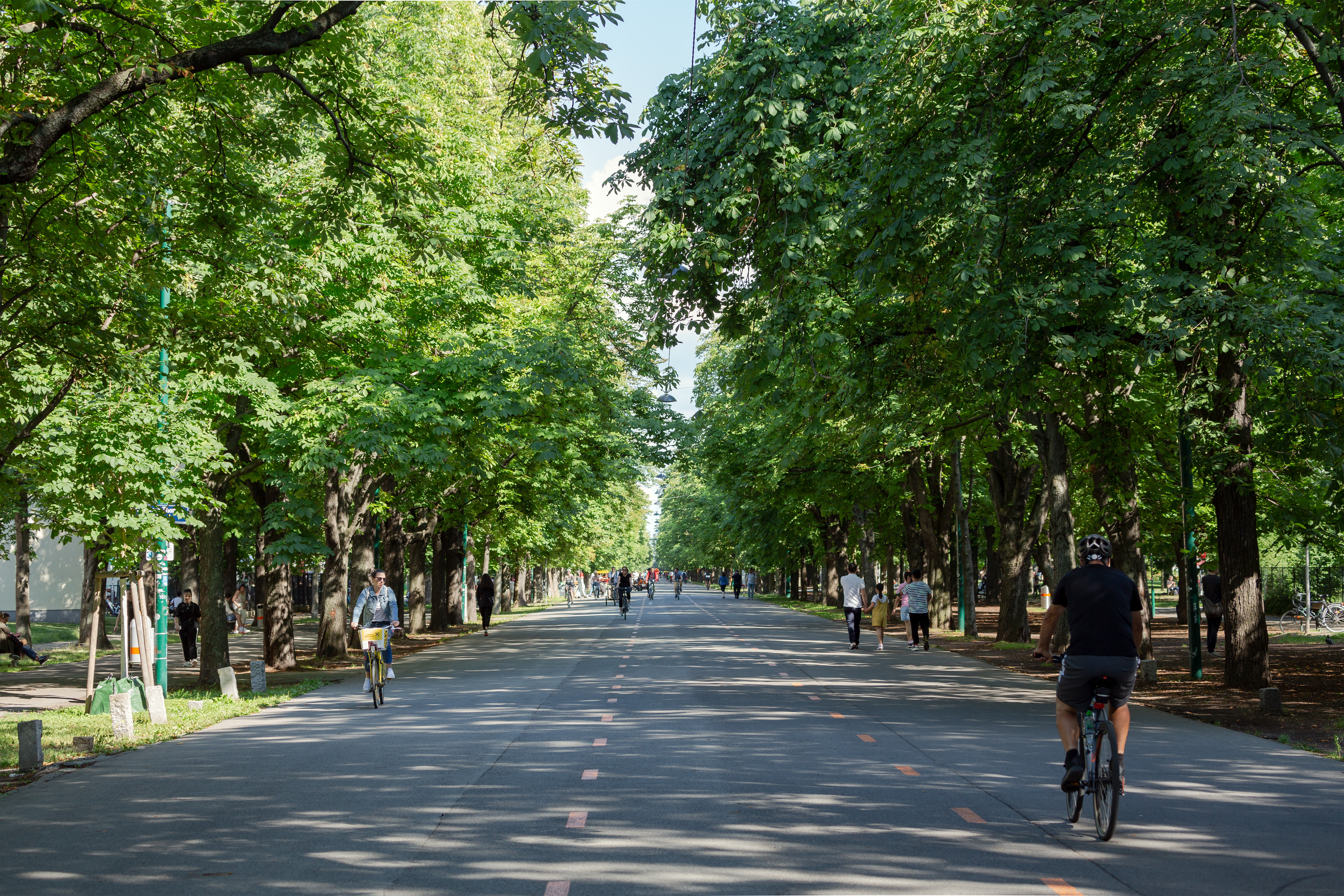 Die Hauptallee im Wiener Prater.